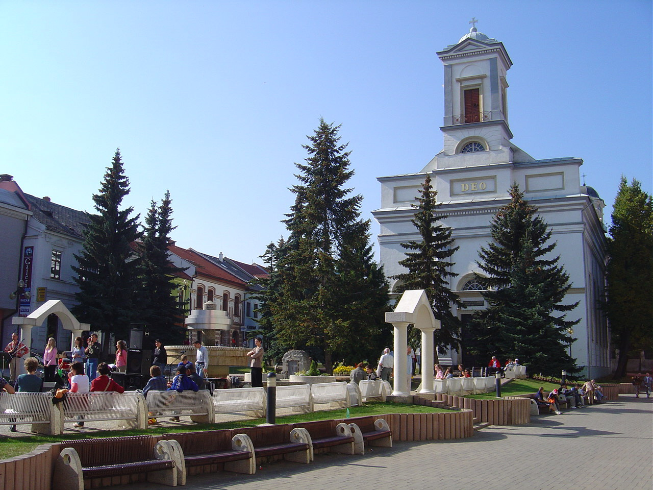 Saint Egidius square in Poprad